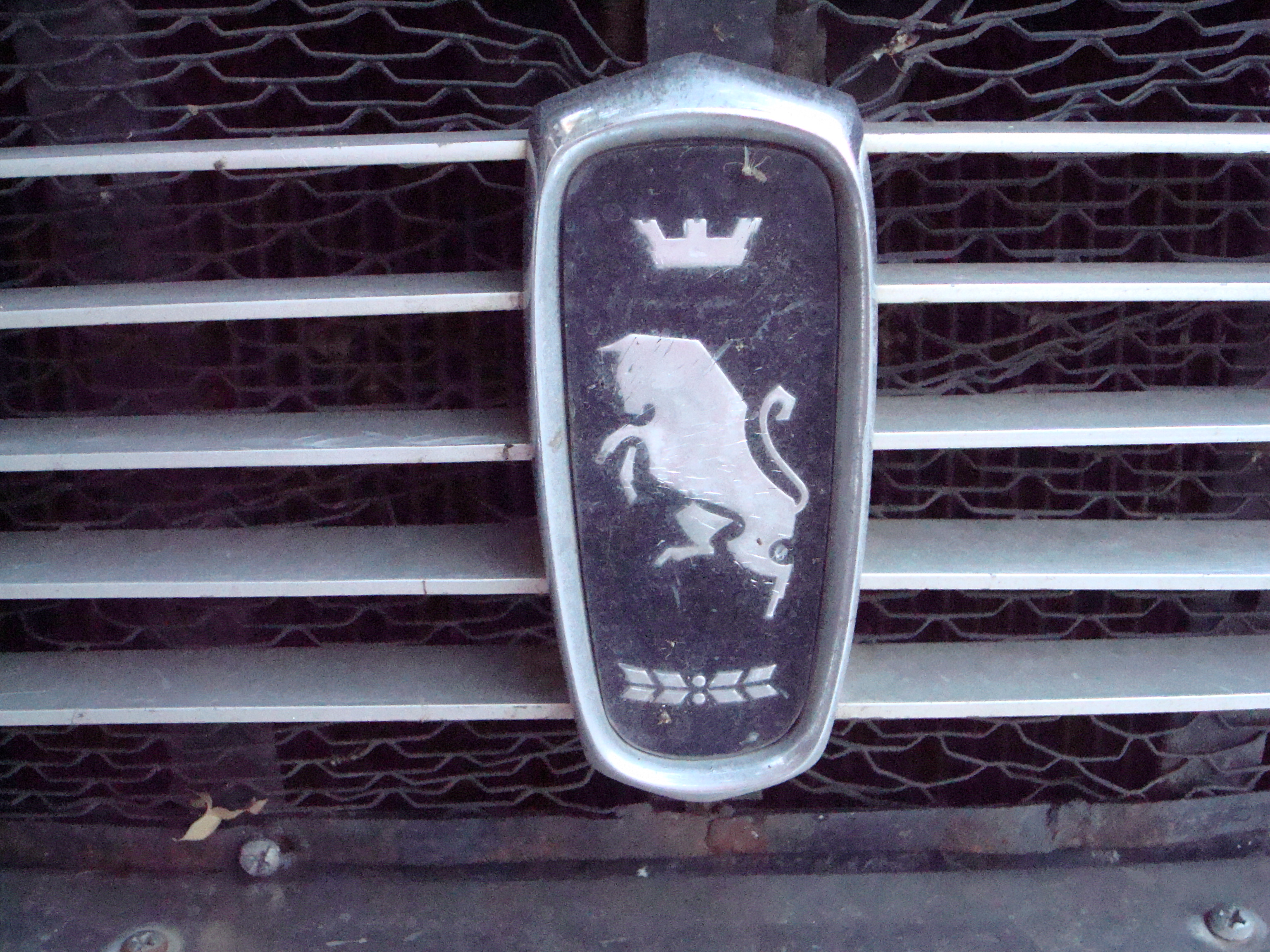 El logo de Torino en la trompa de un modelo S, en Rosario, Argentina